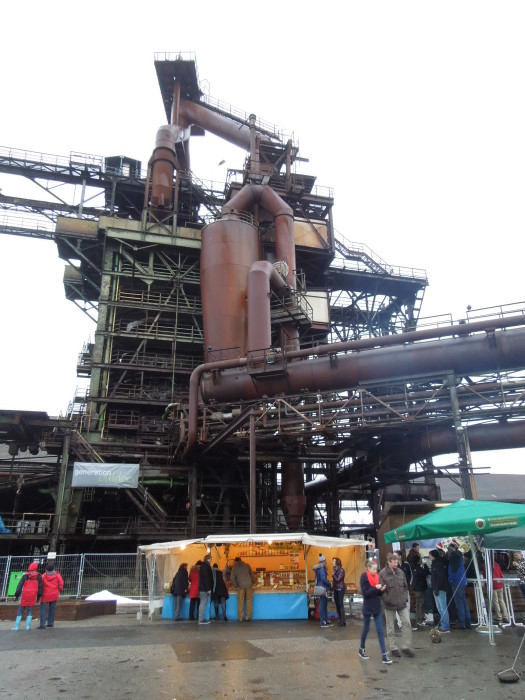 Maxhuette Hochofenplaza mit Würstlbuden